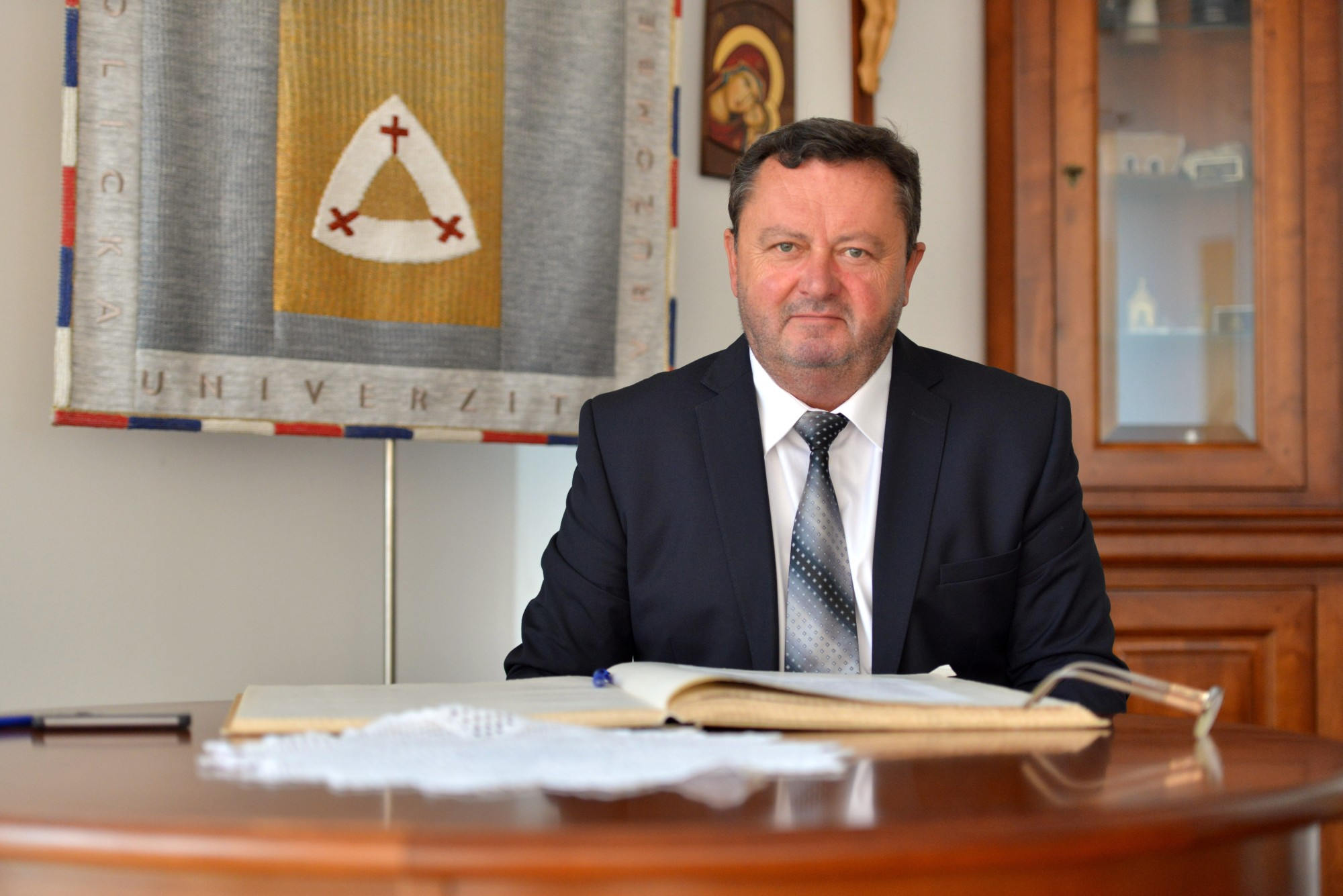 Jaroslav Demko je od roku 2018 rektorom Katolíckej univerzity v Ružomberku.